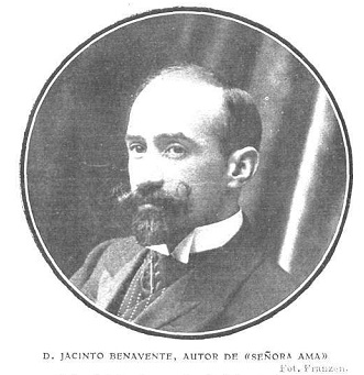 Retrato del dramaturgo Jacinto Benavente, obra de Christian Franzen, recogido en la revista española Actualidades.